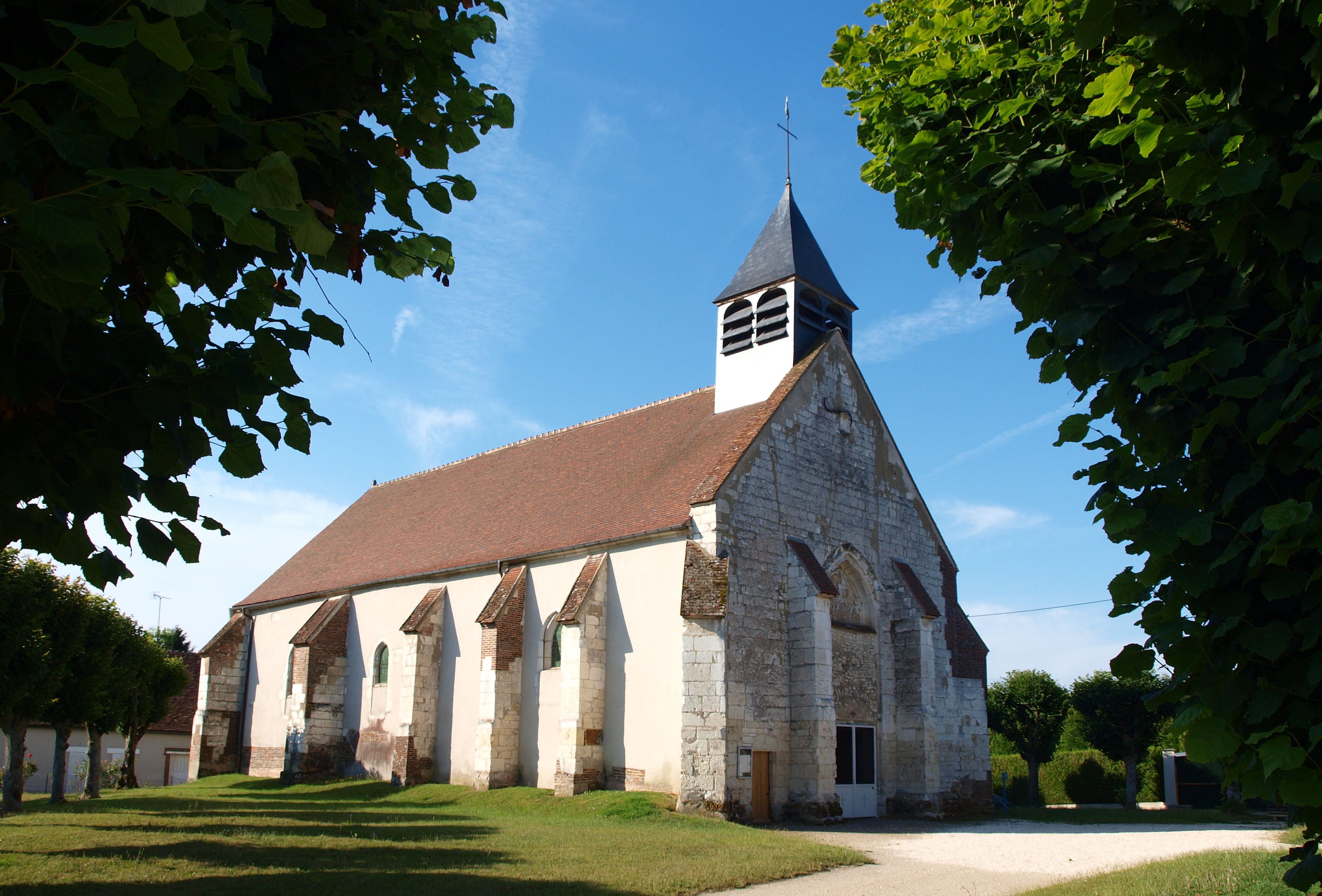 Laduz (Yonne, France)